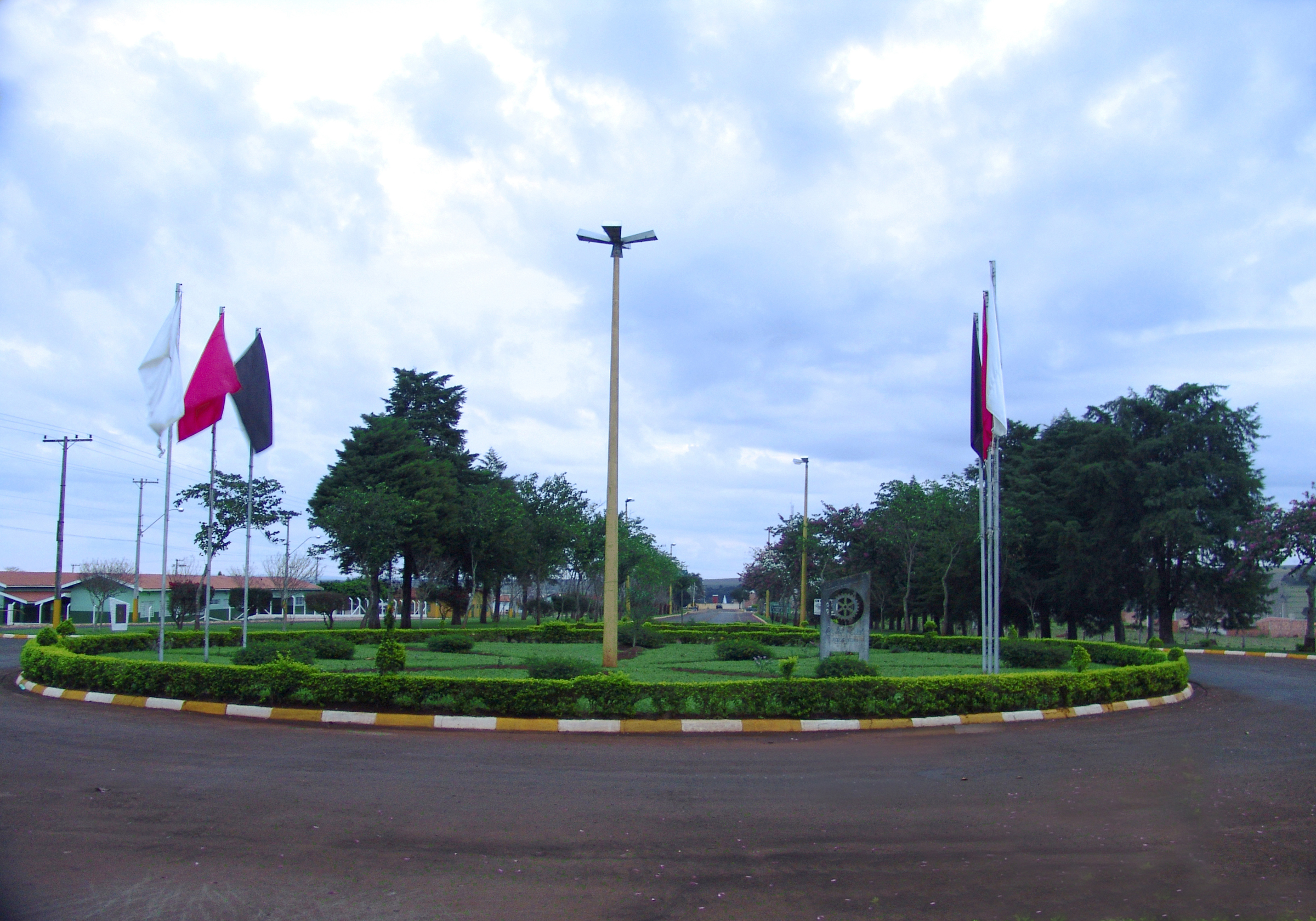 Trevo de entrada da cidade de Arandu, estado de São Paulo, Brasil